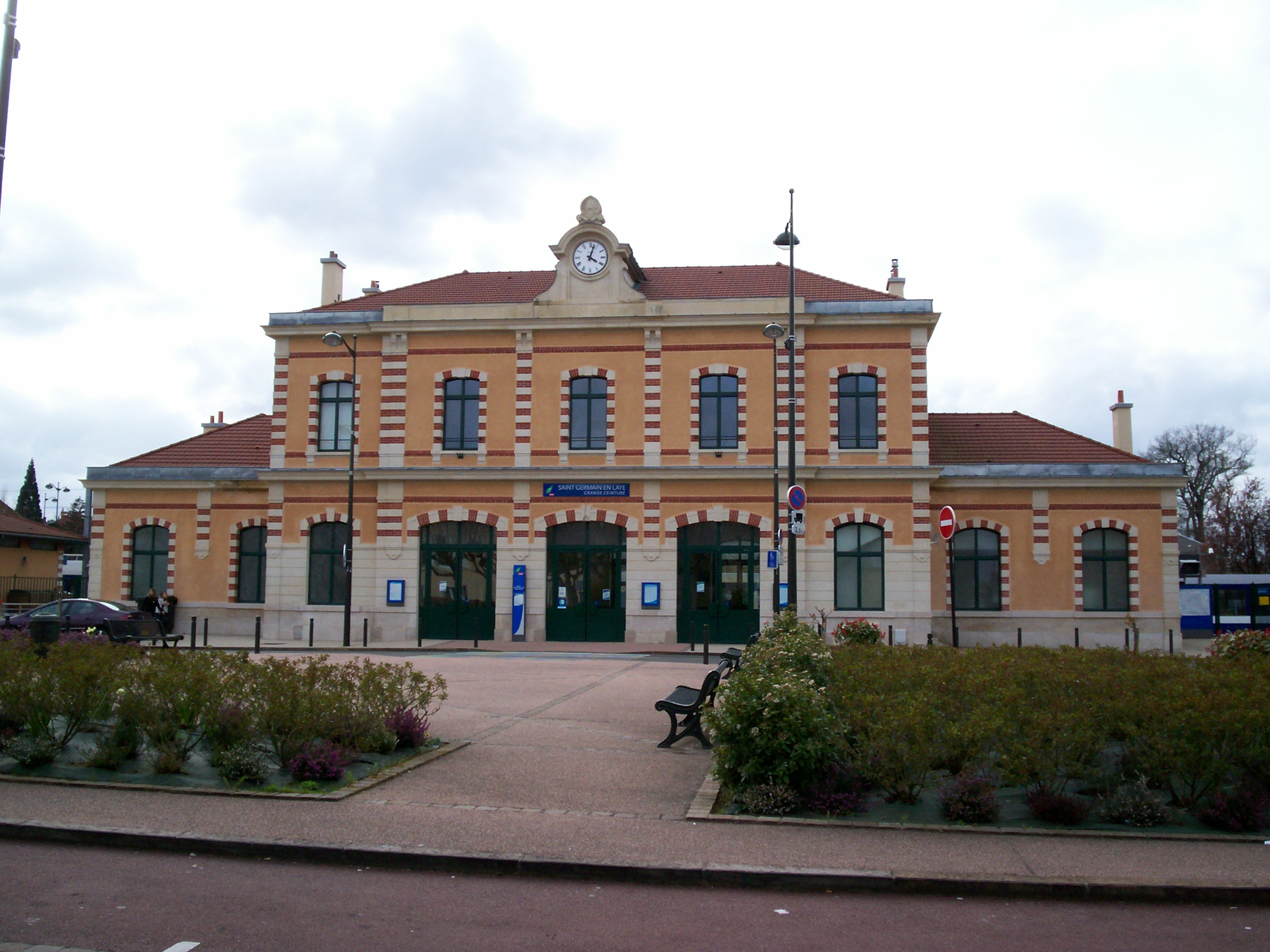 Vue de face, côté place, du bâtiment voyageurs de la gare de Saint-Germain GC